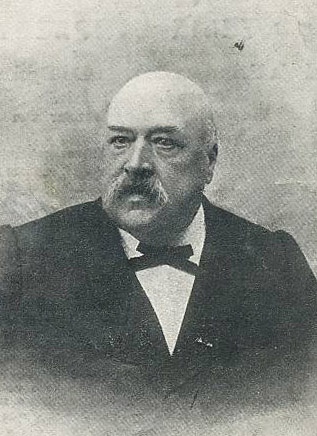 Burgemeester Felix Lampaert - Zomergem - Oost-Vlaanderen - Vlaanderen - België